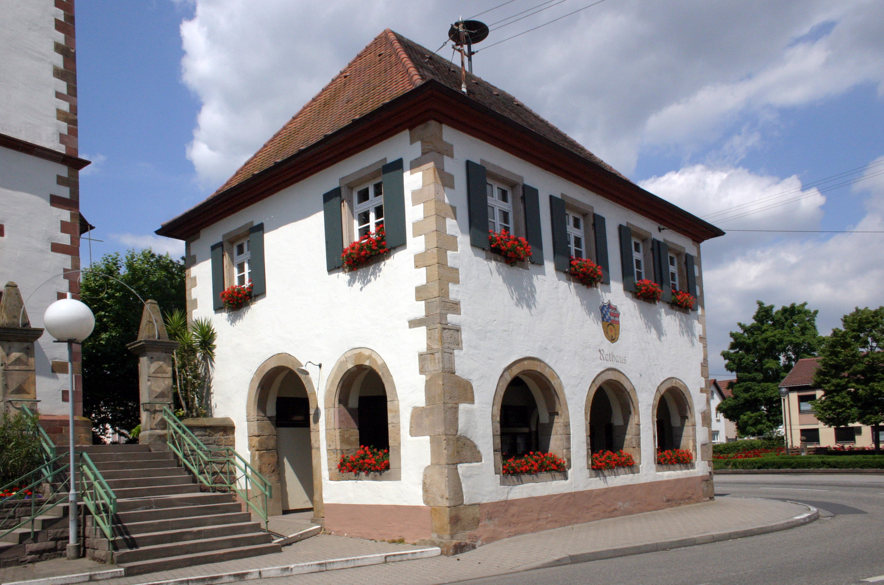 Ottersheim, Germersheimer Straße 1; Rathaus, Walmdachbau, Erdgeschosshalle bezeichnet 1555, Obergeschoss wohl aus dem 18. Jahrhundert.